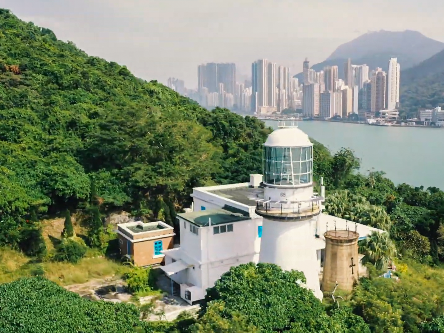 航拍青洲燈塔